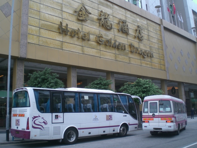 金龍酒店, 穿梭巴士